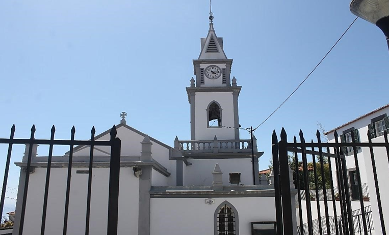 Igreja e Capela de Nossa Senhora da Conceição - Arco da Calheta